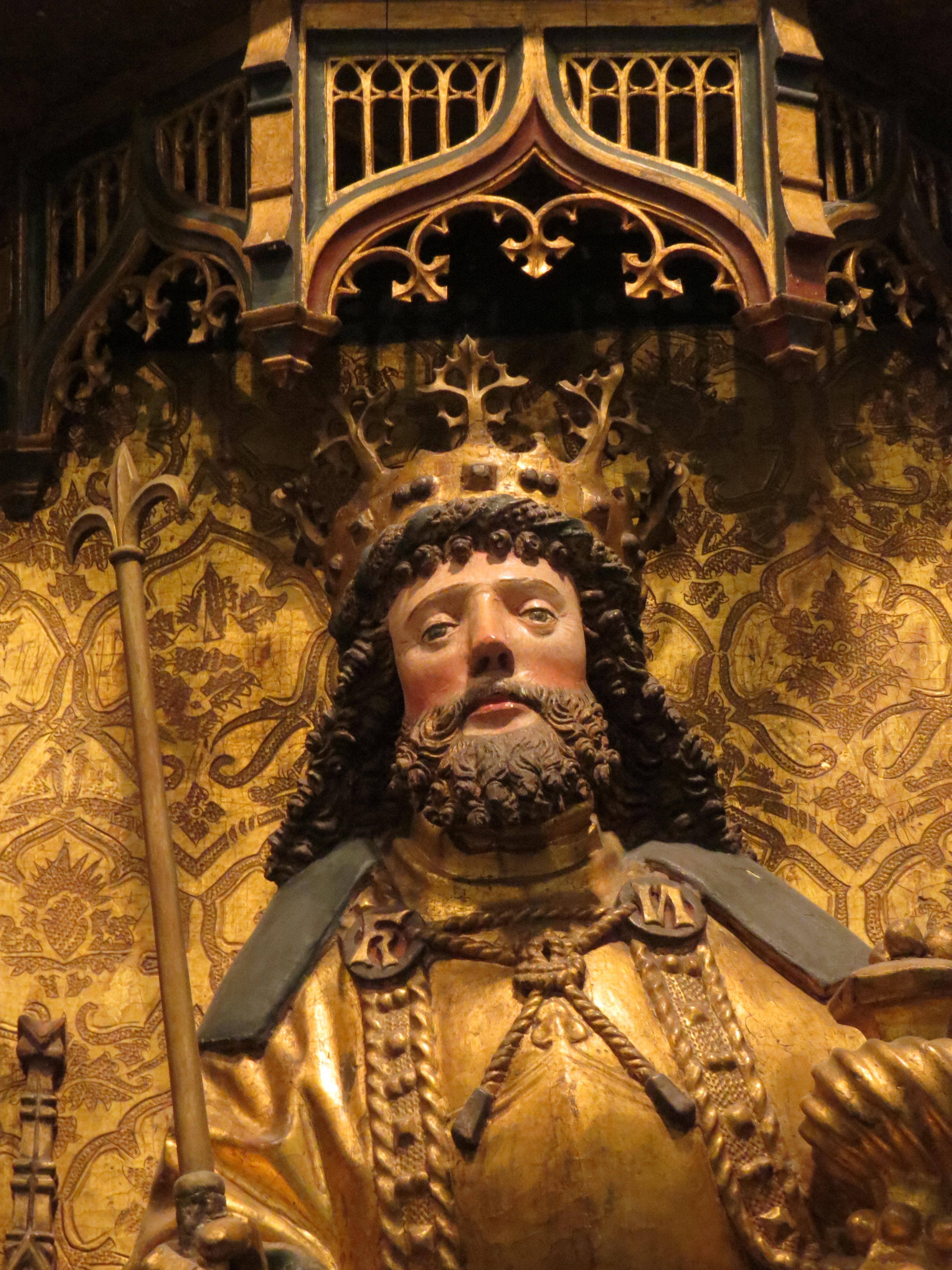 Sankt Knud den Hellige, ca. 1500, detalje fra sidealtertavle fra Sankt Peders Kirke i Næstved, Nationalmuséet i København